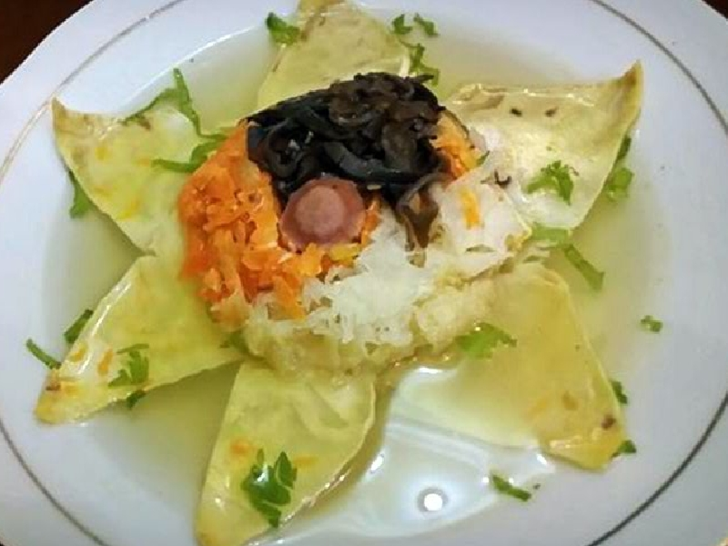 penyajian sup bunga matahari